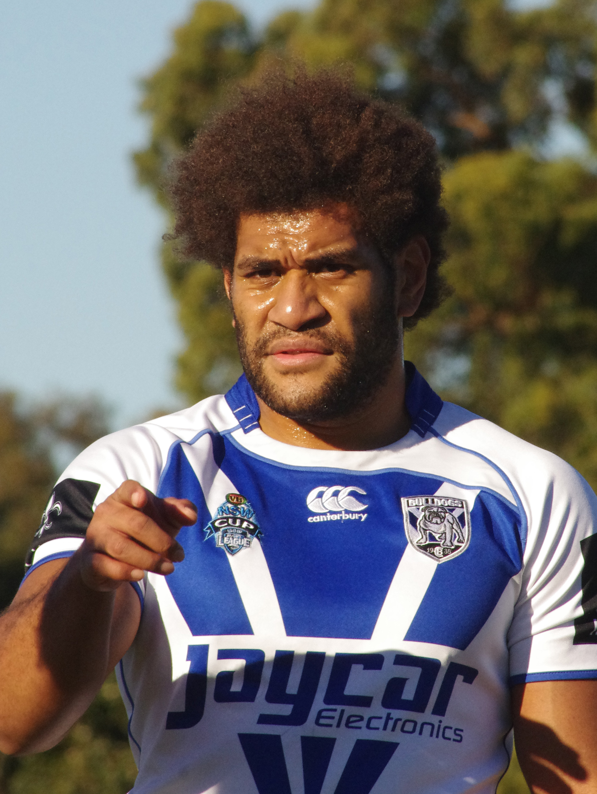 JUNIOR ROQICA